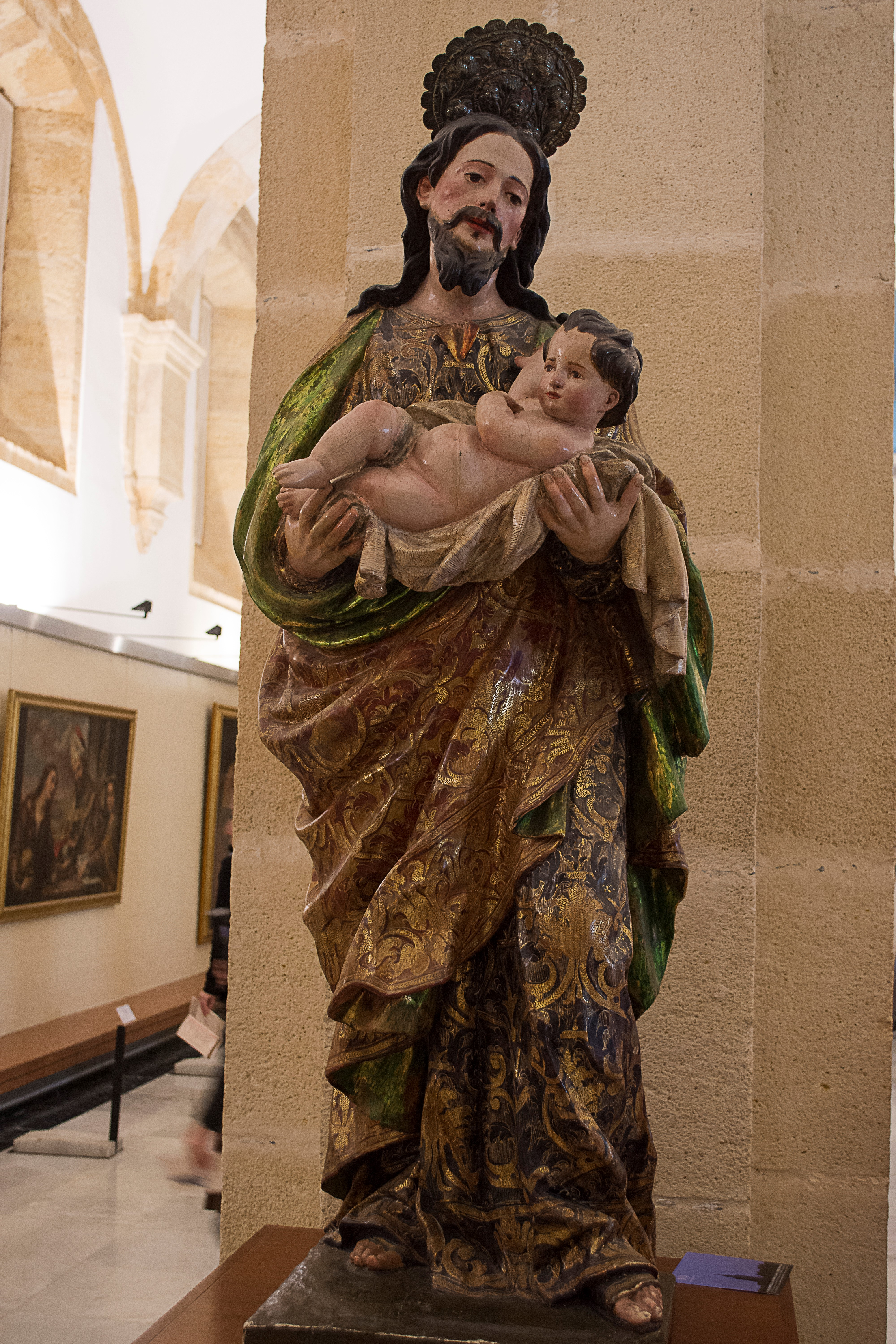 San José con el niño. Autor: Pedro Roldán (1664). Catedral de Sevilla.